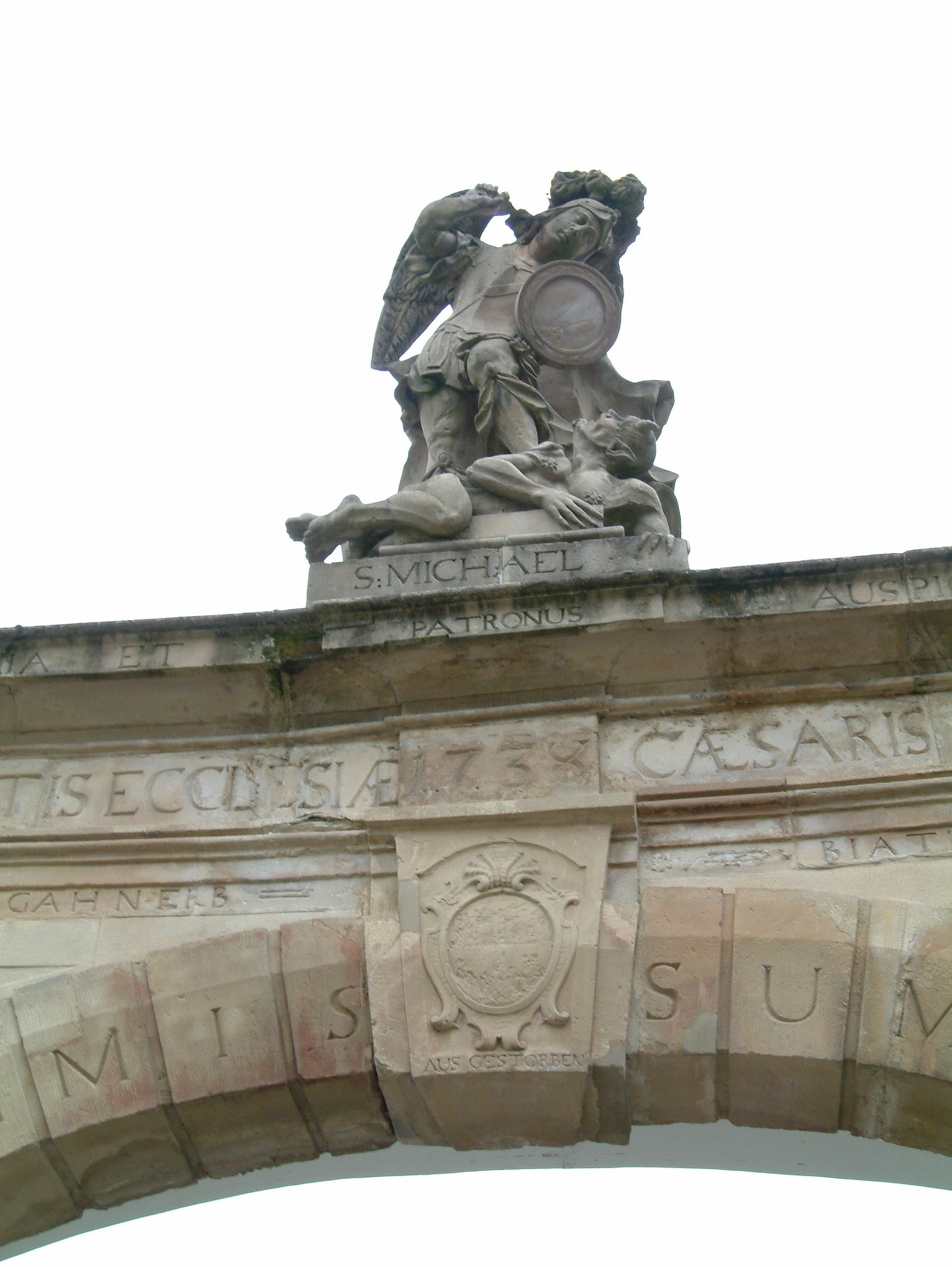 Skulptur auf dem Michelstor am Sturmfederschen Schloss zu Dirmstein, selbst fotografiert am 27.04.2006 und freigegeben durch Benutzer:Mundartpoet